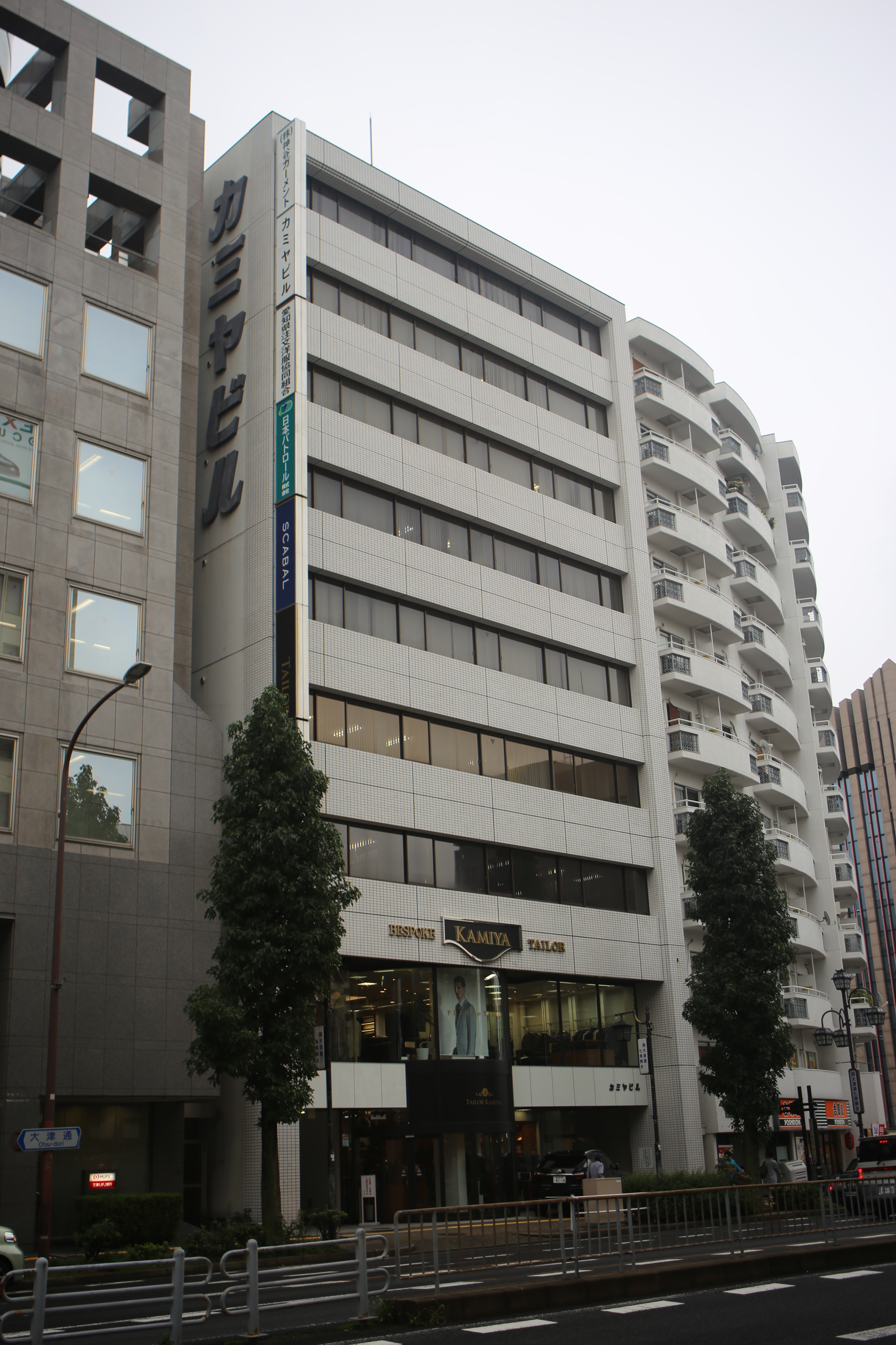 名古屋市中区大須四丁目のカミヤビル